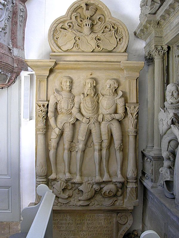 Evangelische Pfarrkirche Hl. Dreifaltigkeit (Rentweinsdorf, Landkreis Haßberge, Unterfranken). Epitaph für Sebastian, Hans und Martin von Rotenhan (um 1560). Eigene Aufnahme, Juli 2007 / Protestant parish church Holy Trinity at Rentweinsdorf (Lower Franconia, Germany). Epitaph of Sebastian, Hans und Martin von Rotenhan (ca. 1560). Own photo, July 2007